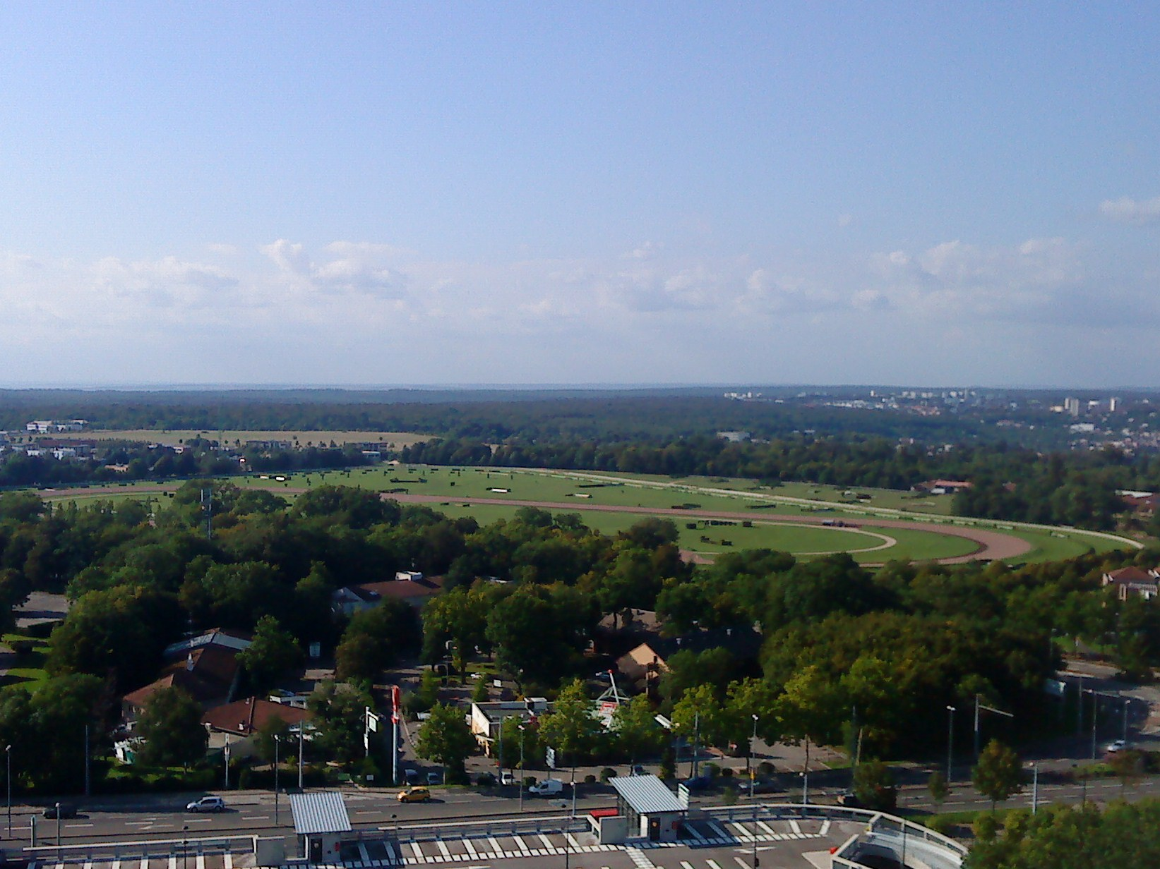 Vue général de la piste de l'hippodrome de Nancy-Brabois.